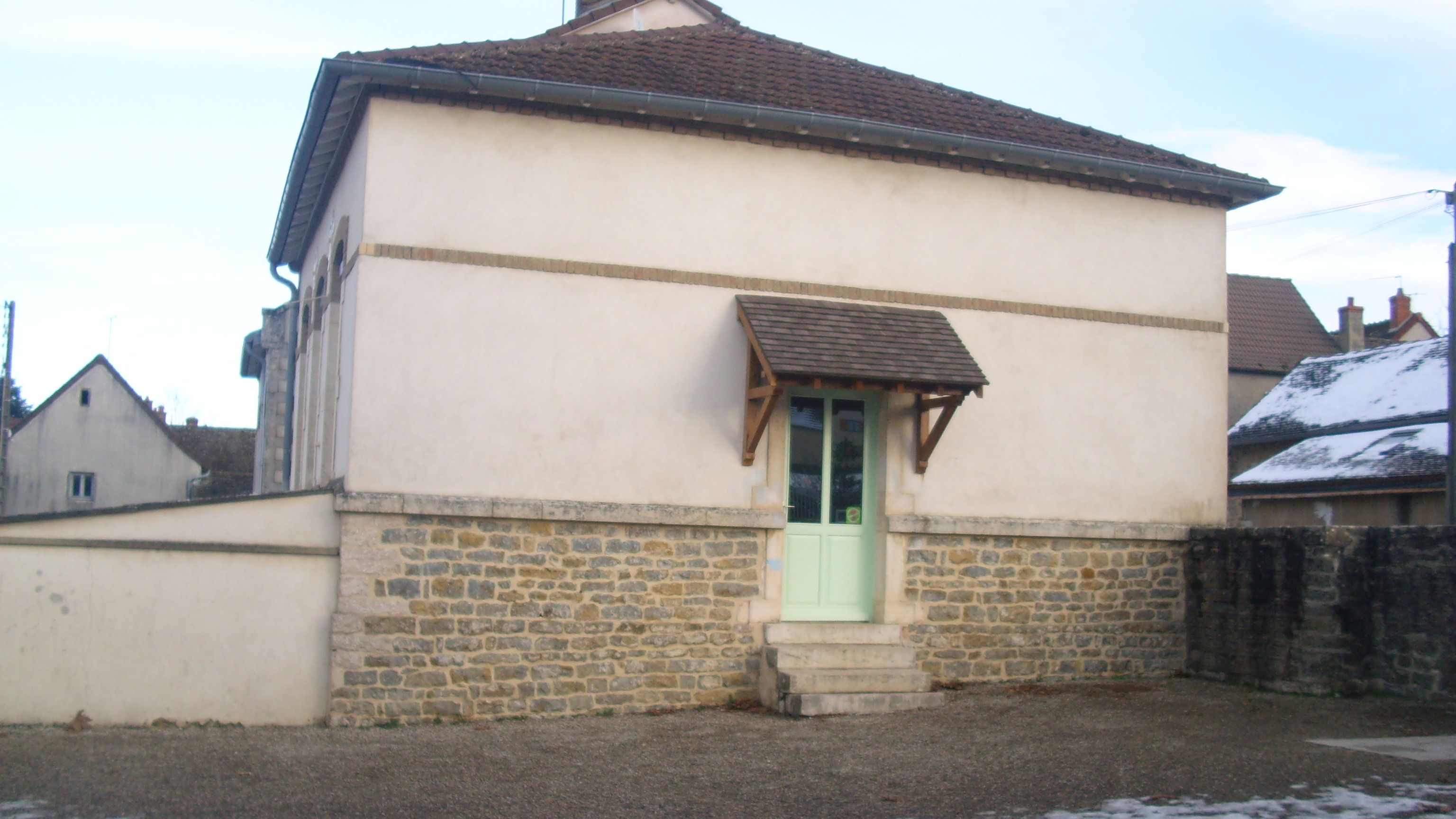 Ecole de Saint-Denis-de-Vaux (71)